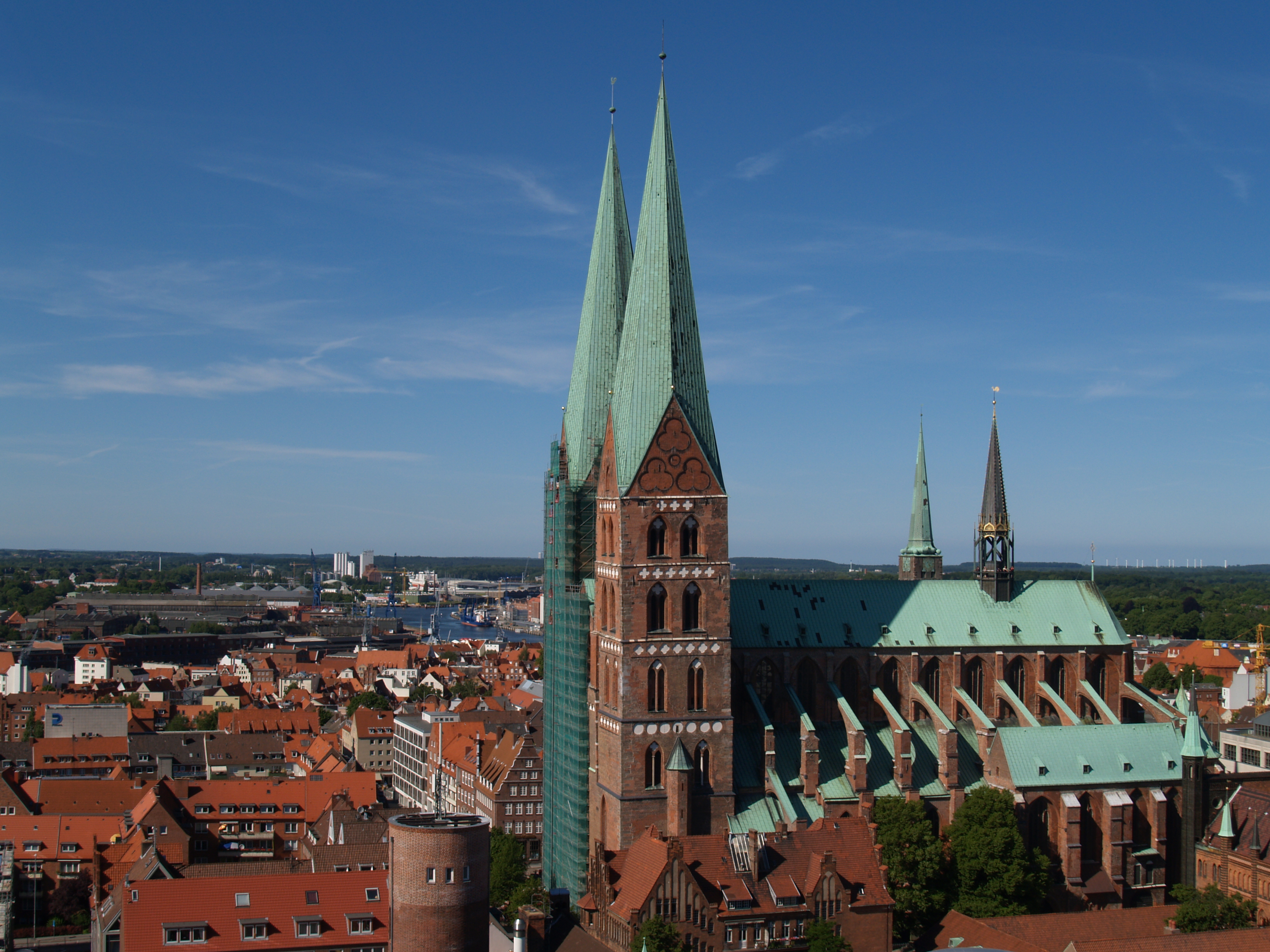 Blick über die Dächer von Lübeck von St. Petri aus nach Norden mit Marienkirche